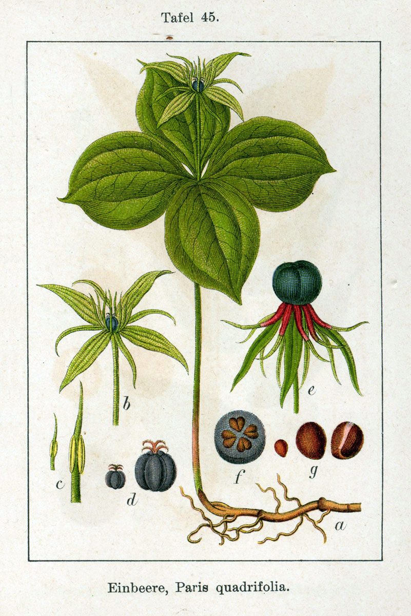 Paris quadrifolia L. Original Description Einbeere, Paris quadrifolia